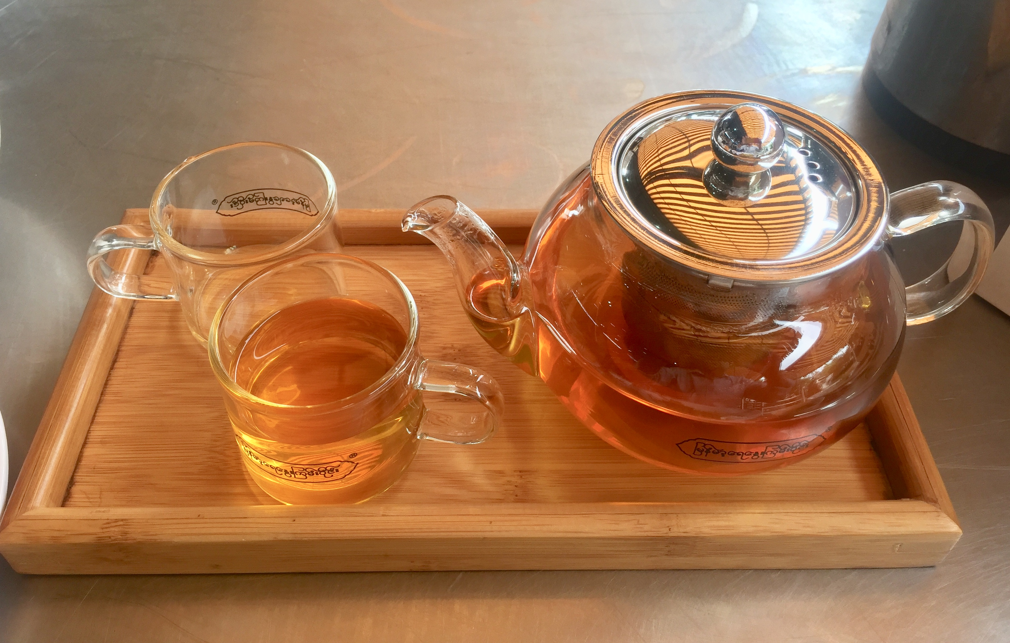 မြန်မာဘာသာ: ရေနွေးကြမ်း